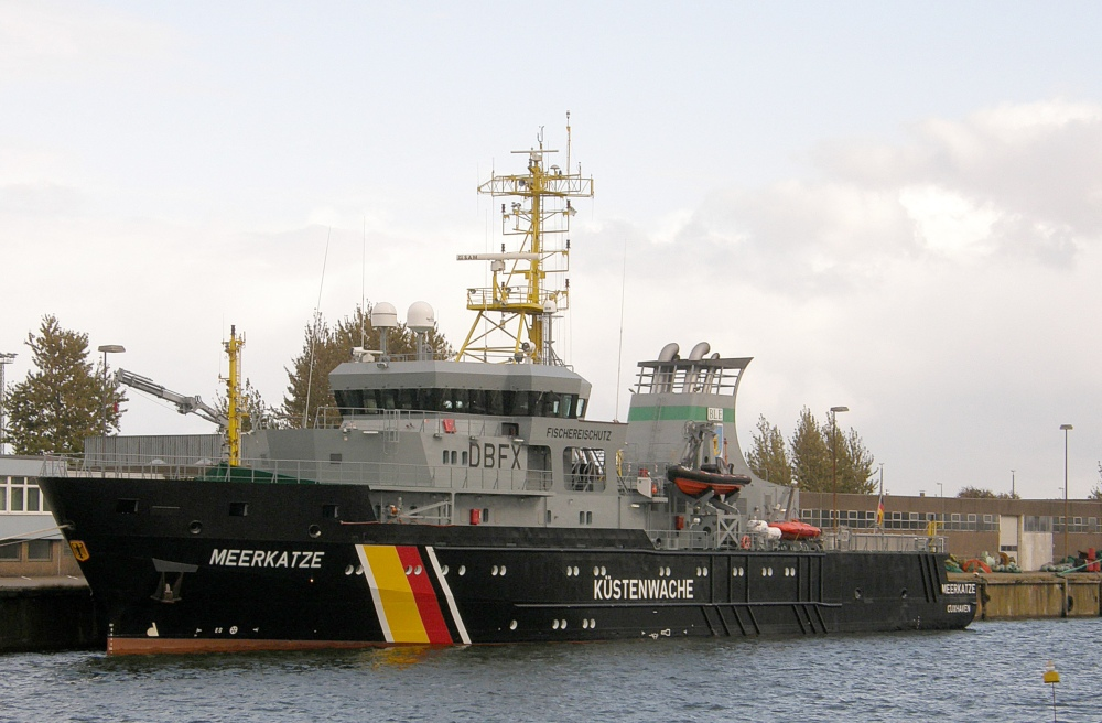 Meerkatze